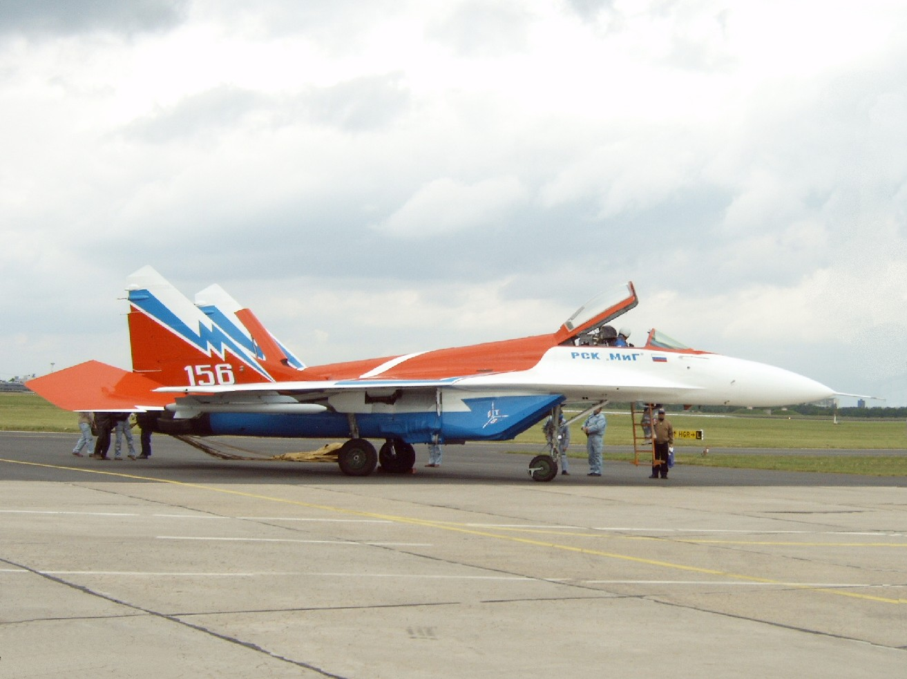 MIG 29 auf der ILA 2006 nach der Luftshow